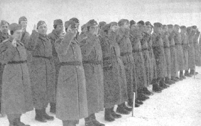 Domobranski prisega 30. januarja 1945